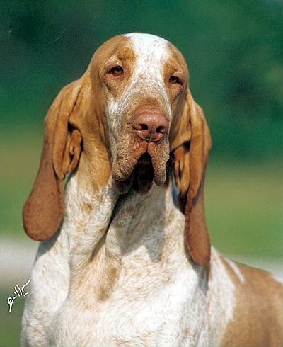 Rivana del Monte Alago. Sicilianu: La campiunissa dû munnu di l'annu 2000 Rivana del Monte Alago.